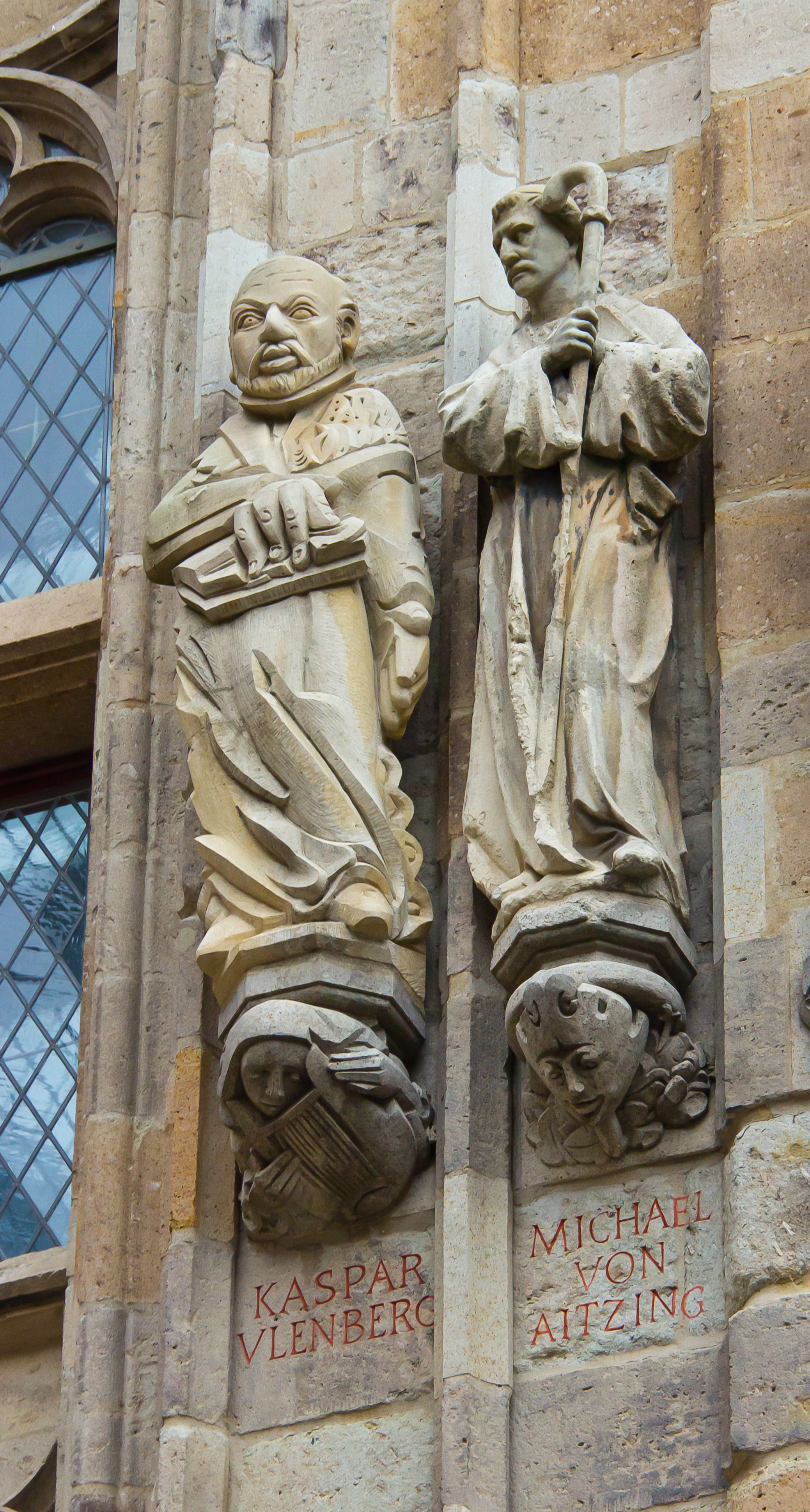 Rathausturm Köln - Figuren des Kaspar Ulenberg/Caspar Ulenberg und Michael von Aitzing